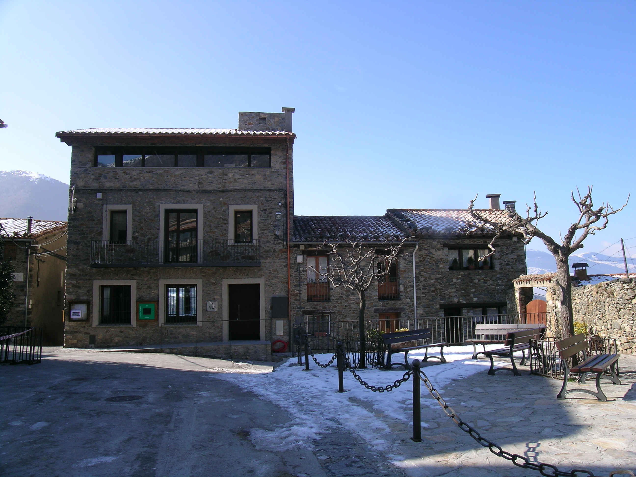 Ajuntament de Pardines (Ripollès) 1226 m. 14/2/2010 12h 24mn